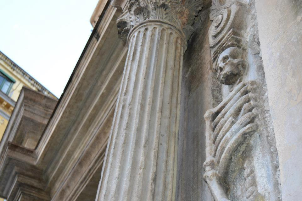 Particolare dell'ingresso della Chiesa del Monte dei Morti di Salerno